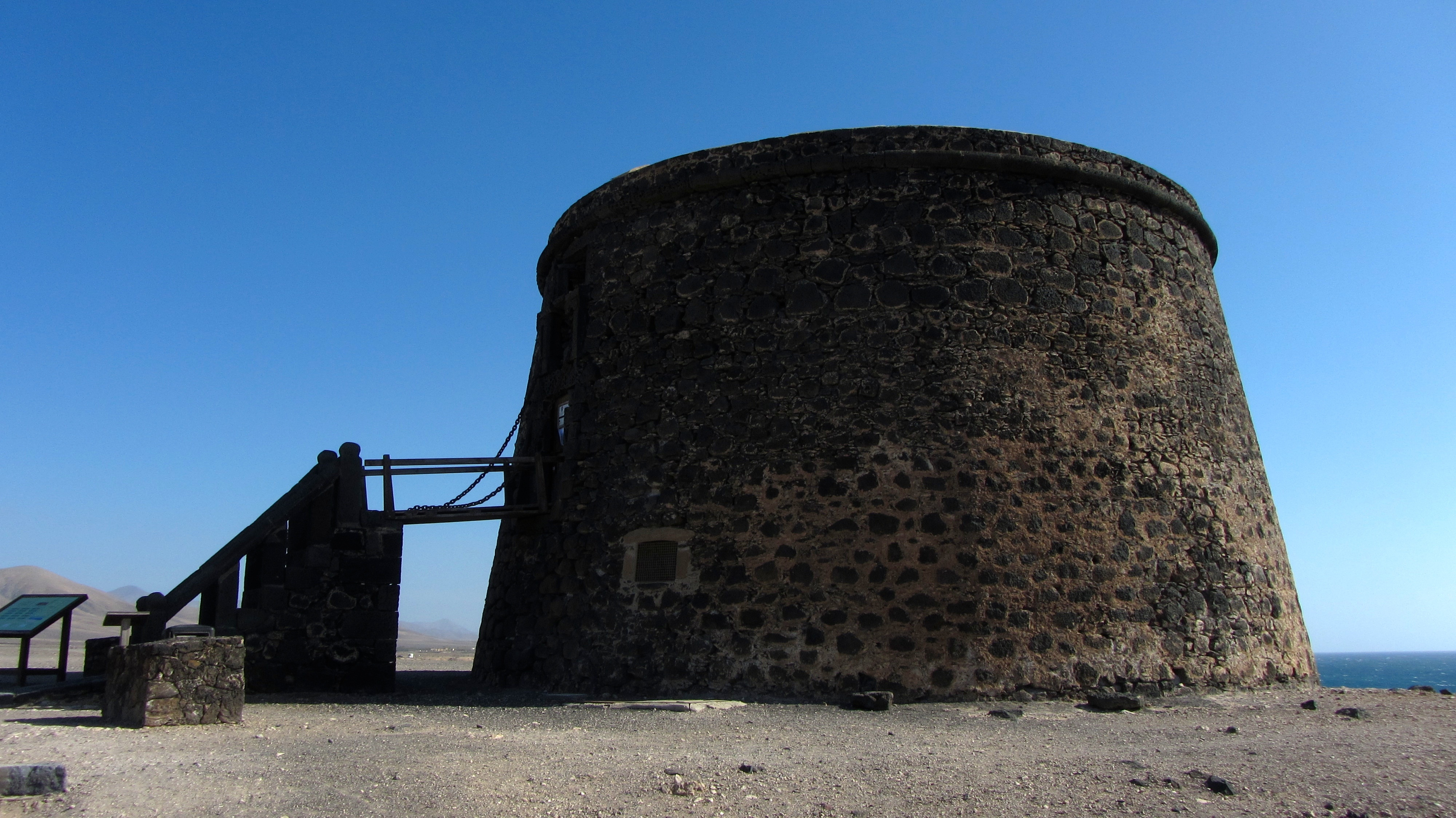 Castillo de El Cotillo, La Oliva, Fuerteventura.